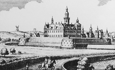 Schloss Bückeburg auf einem Stich von Matthäus Merian